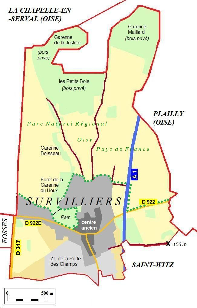 Plan schématique du territoire communal de Survilliers.